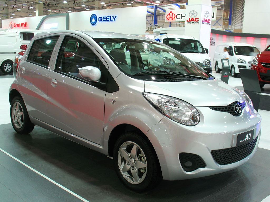 JAC A0 2010